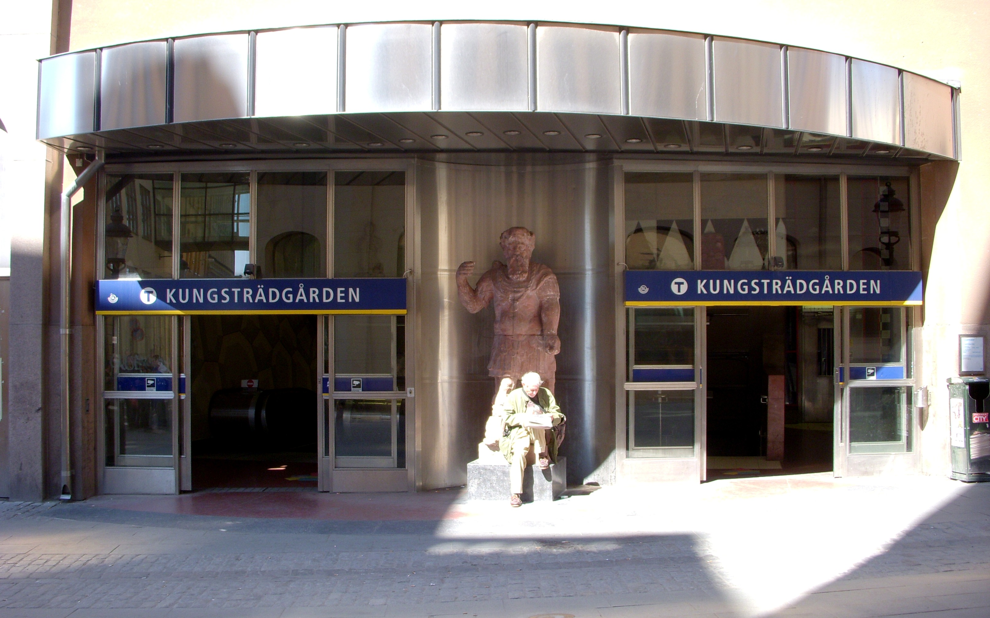 T-banestation "Kungsträdgården", Stockholm